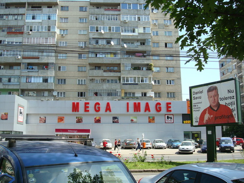 Mega Image Ploiesti (31 mai 2008 - Bd Republicii)